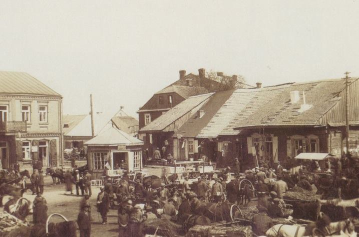 Беларуская (тарашкевіца): Столін (Stolin), пляц Рынак (plac Rynak)